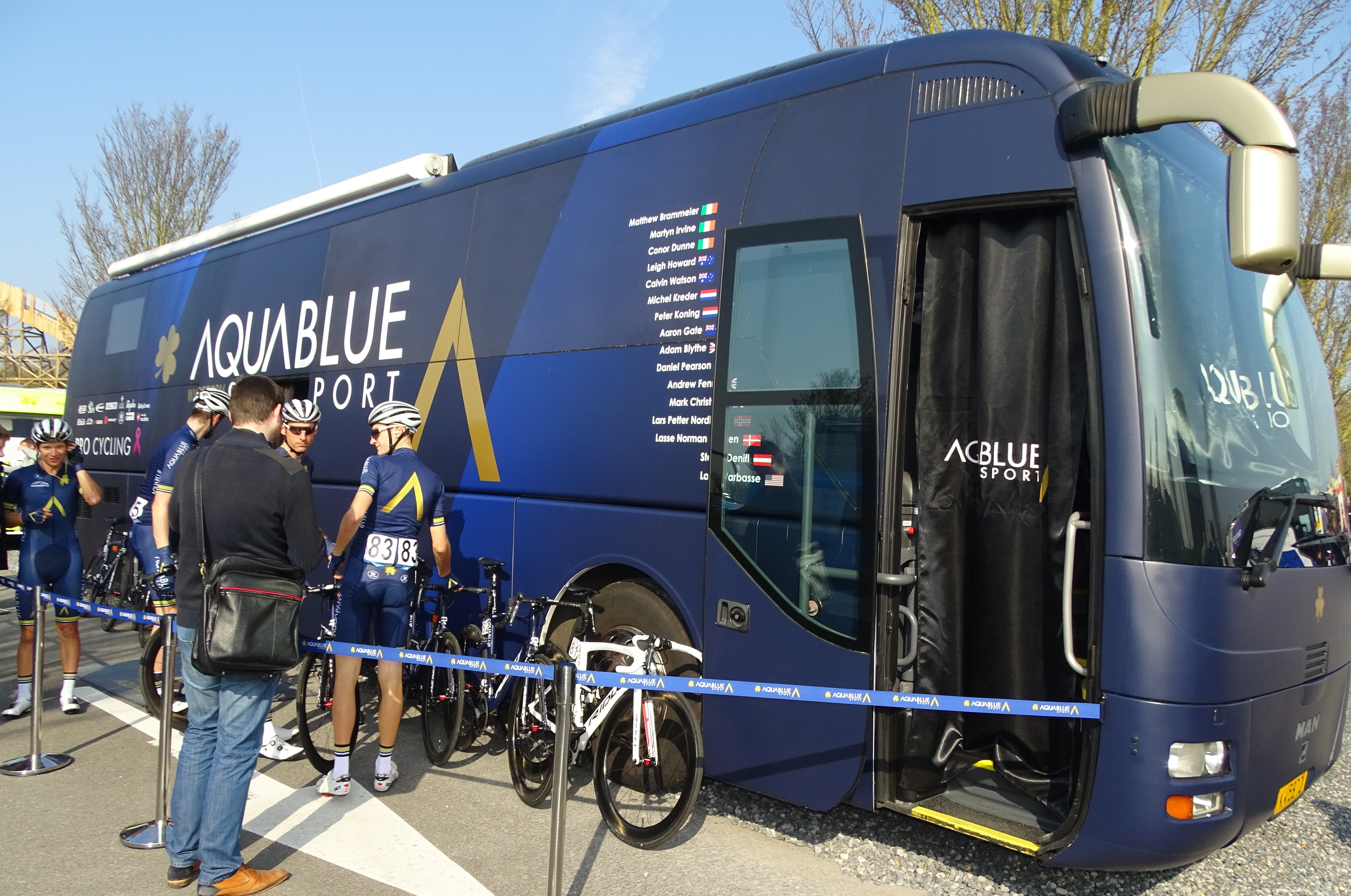 Reportage réalisé le mardi 28 mars à l'occasion de du départ de la première étape des Trois jours de La Panne 2017 à Adinkerque (La Panne), Belgique.